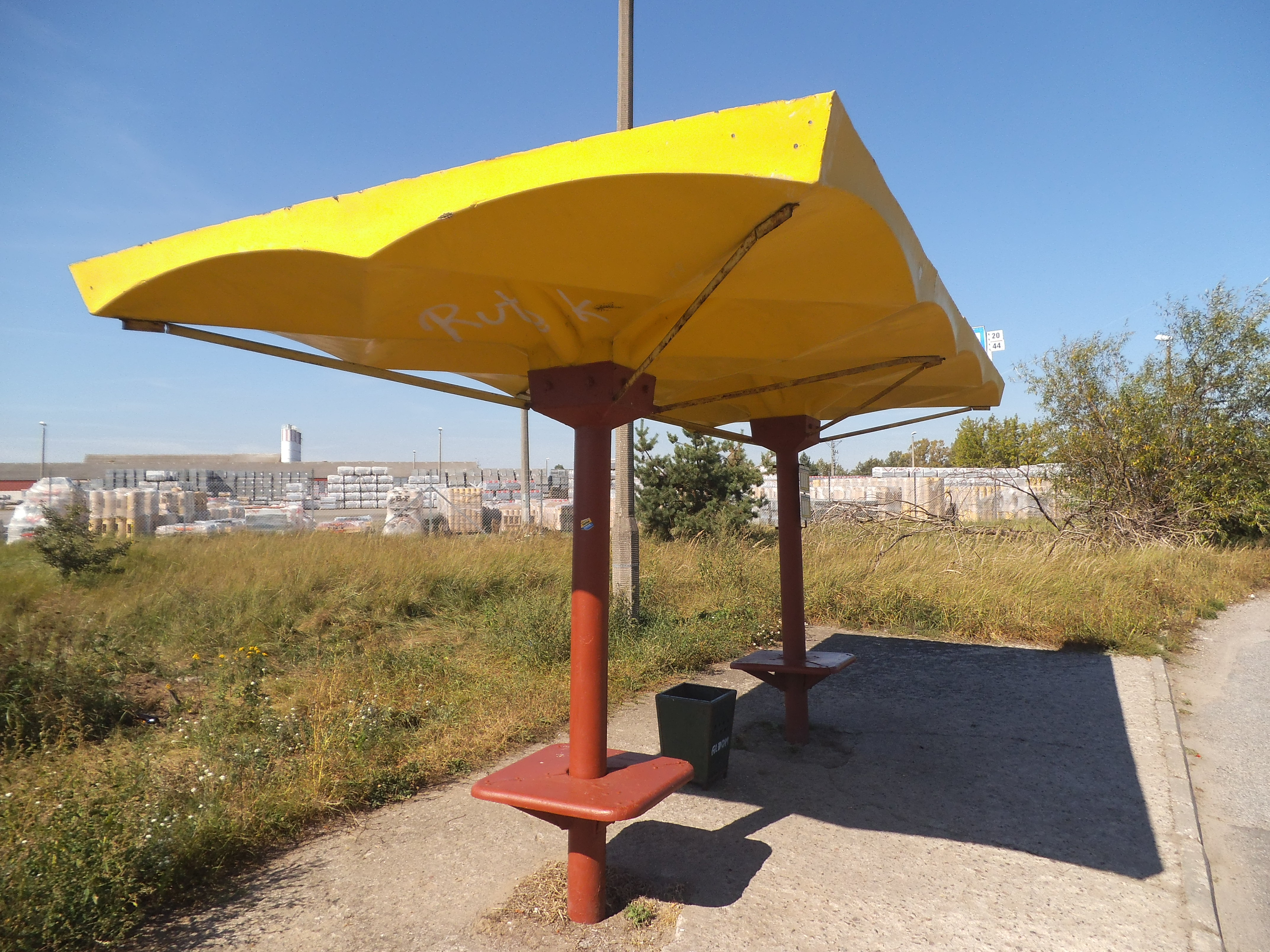 Pętla autobusowa na Glinkach w Toruniu